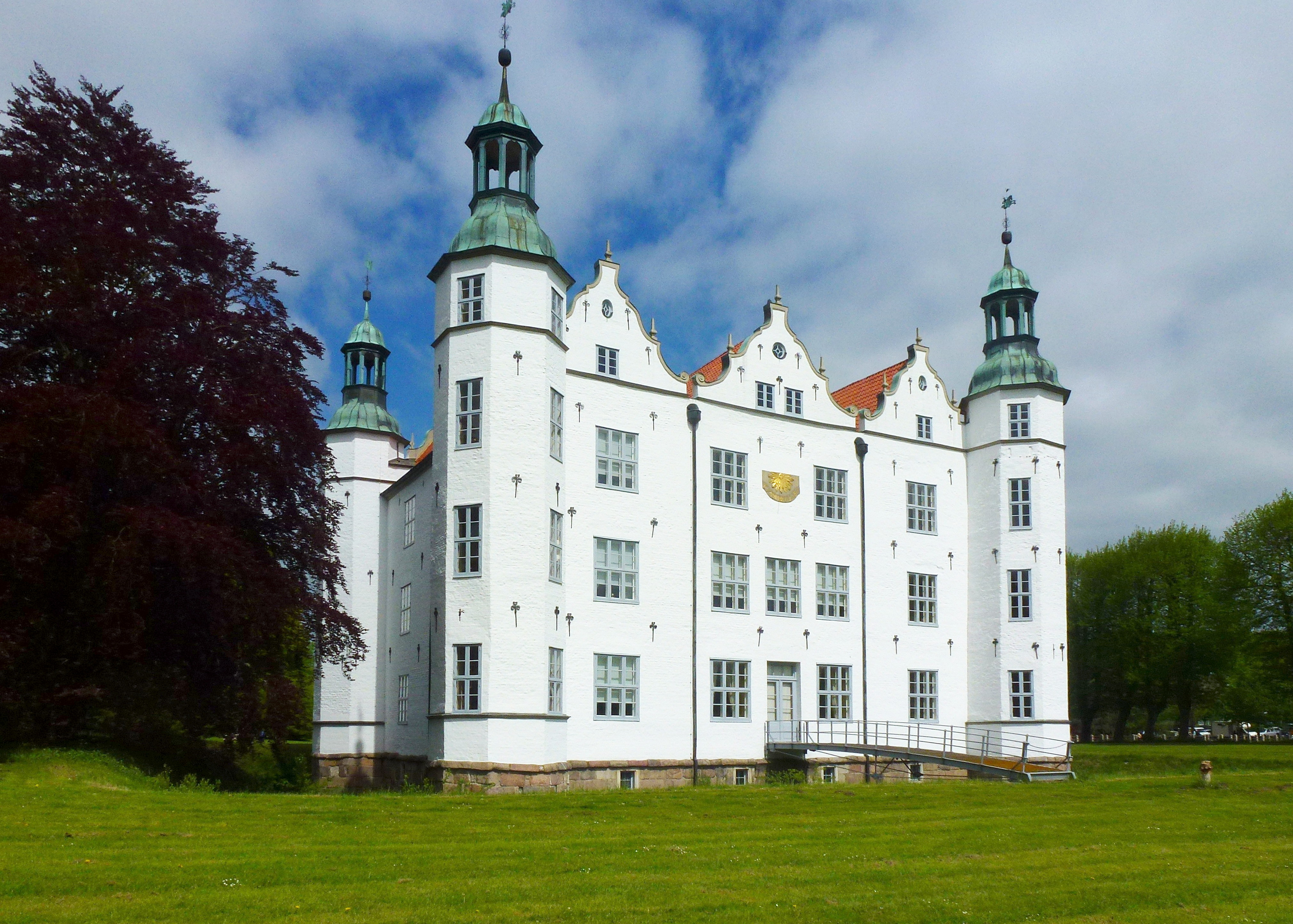 Schloss Ahrensburg von Südwesten